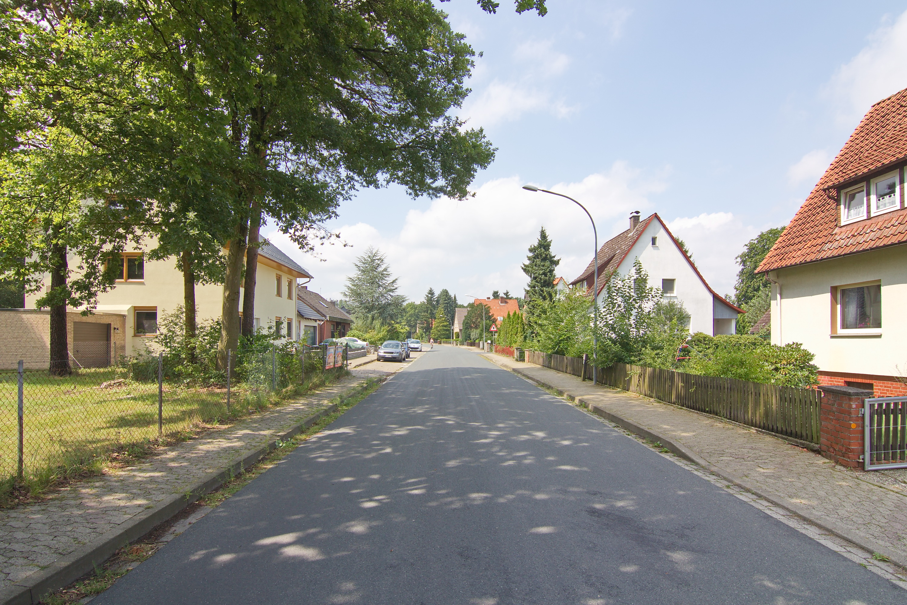 Gemeinde Adelheidsdorf in Niedersachsen, Deutschland